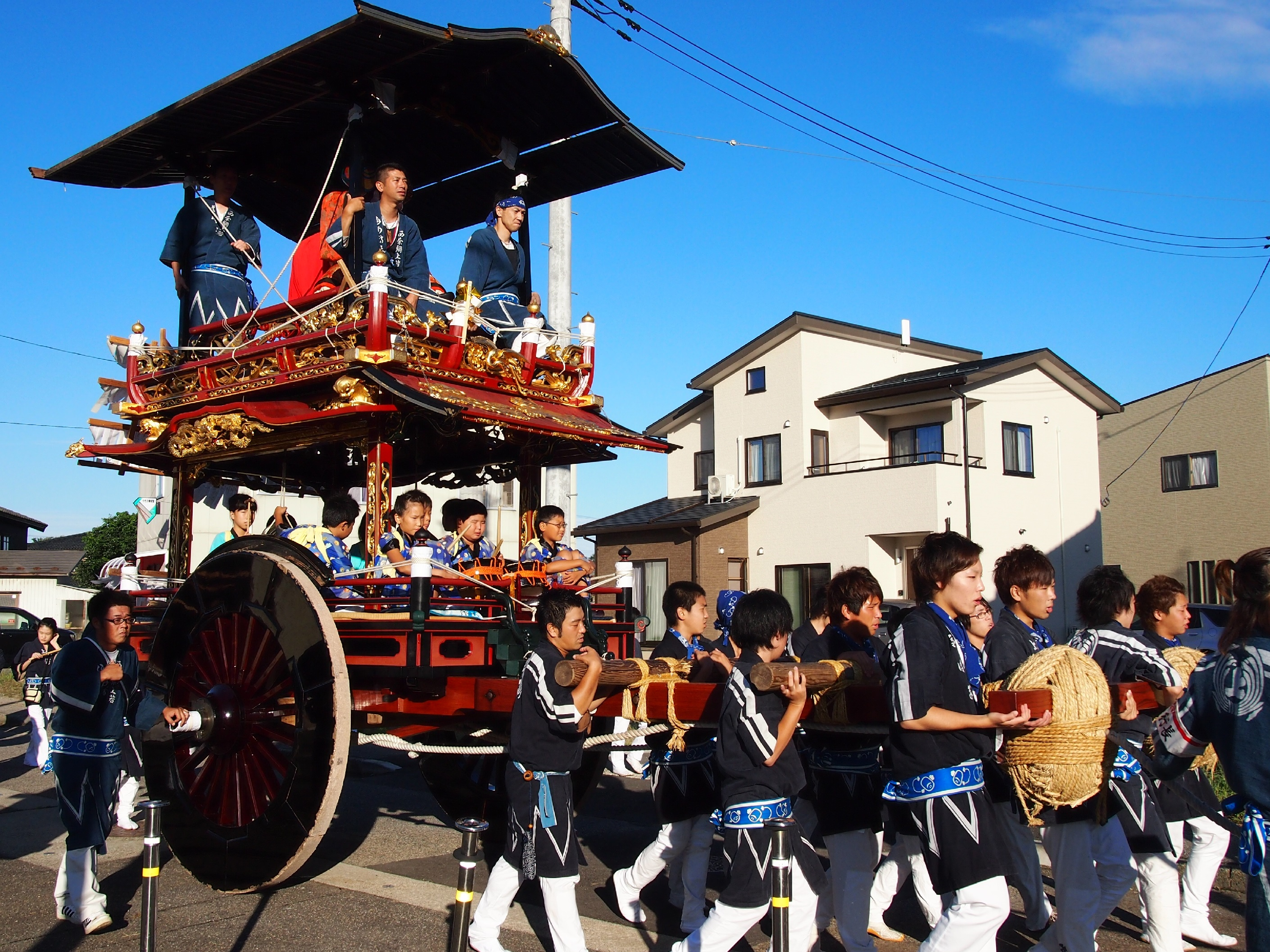 おしゃぎり